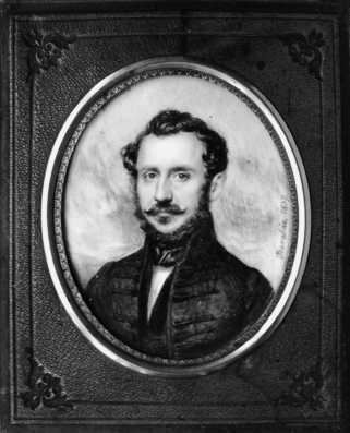 Bártfay László (1797–1858) jogász, az MTA levelező, a Kisfaludy Társaság alapító tagja. Barabás Miklós akvarellje (MTA)